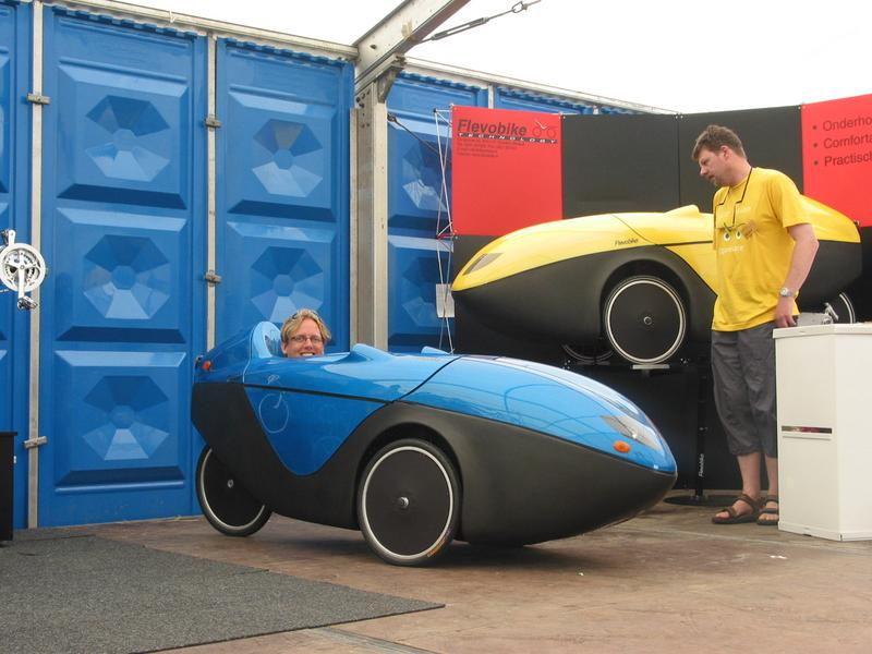 Versatile, Toestemming gekregen van Wilbert berendsen om foto's van zijn website te gebruiken. zie [1] of [2]